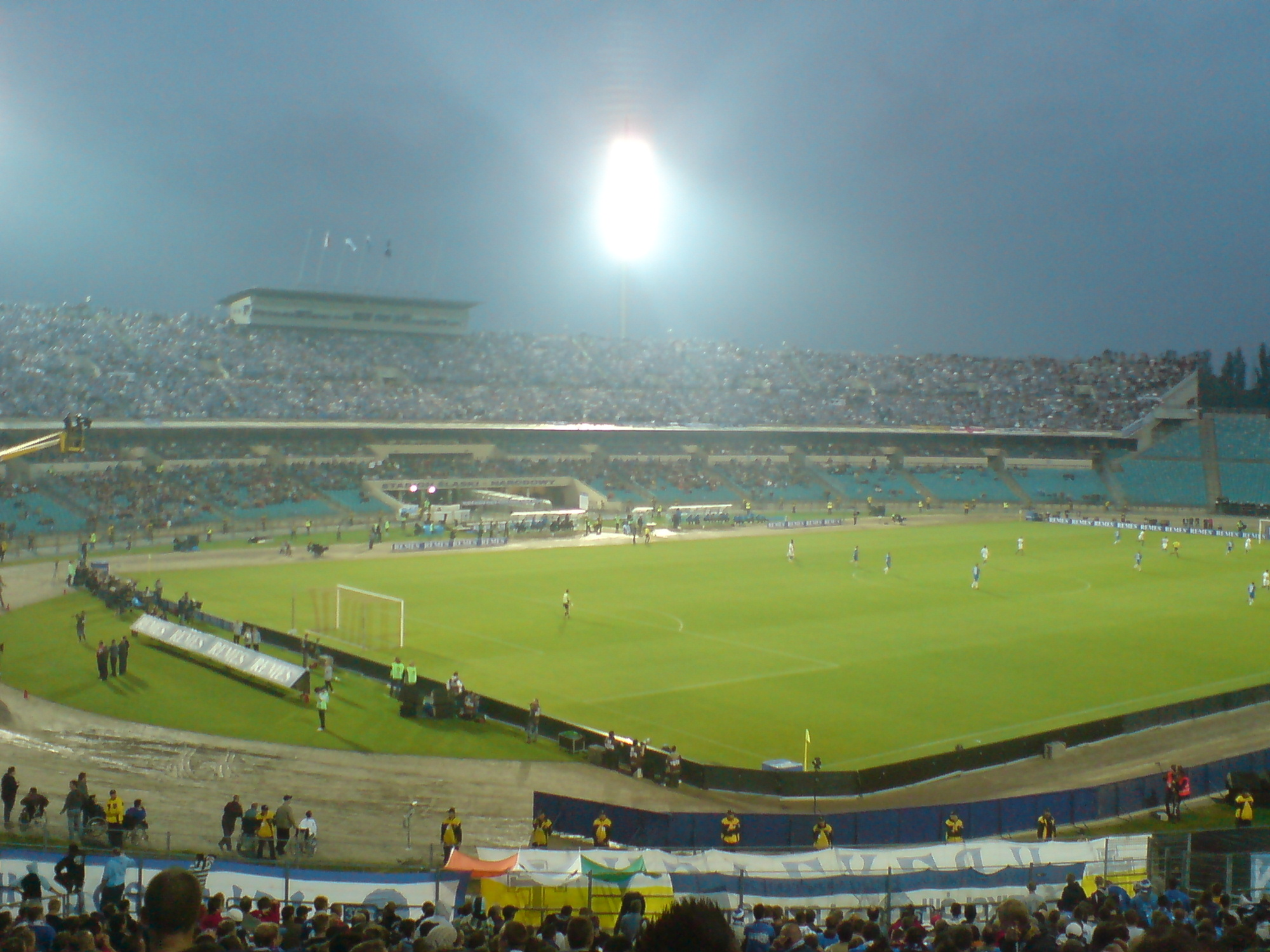 Finał Pucharu Polski 2009 na Stadionie Śląskim w Chorzowie Ruch Chorzów - Lech Poznań 0:1 (0:0)